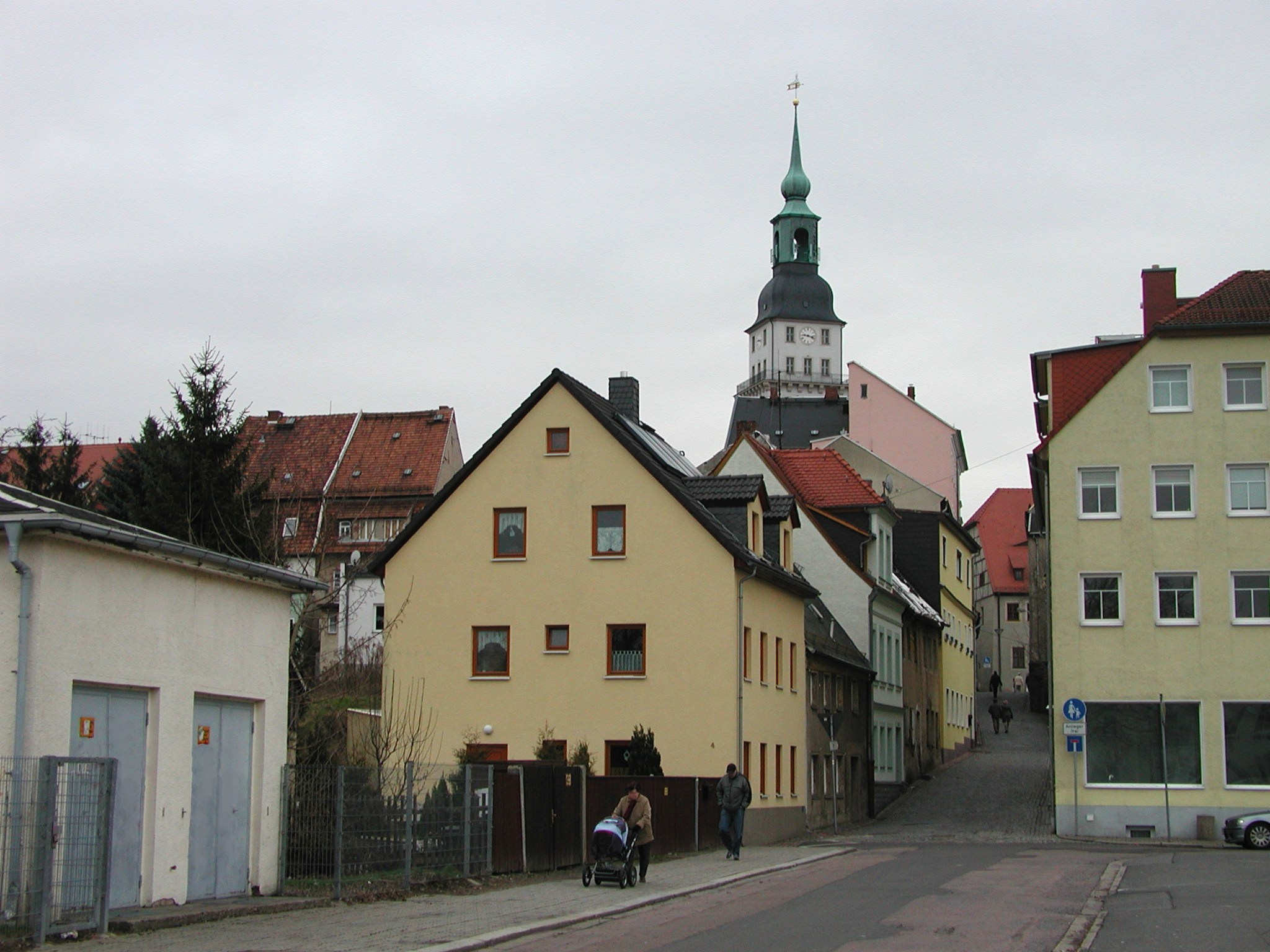 Frankenberg/Sa., Blick auf den Stadtkern von Süden